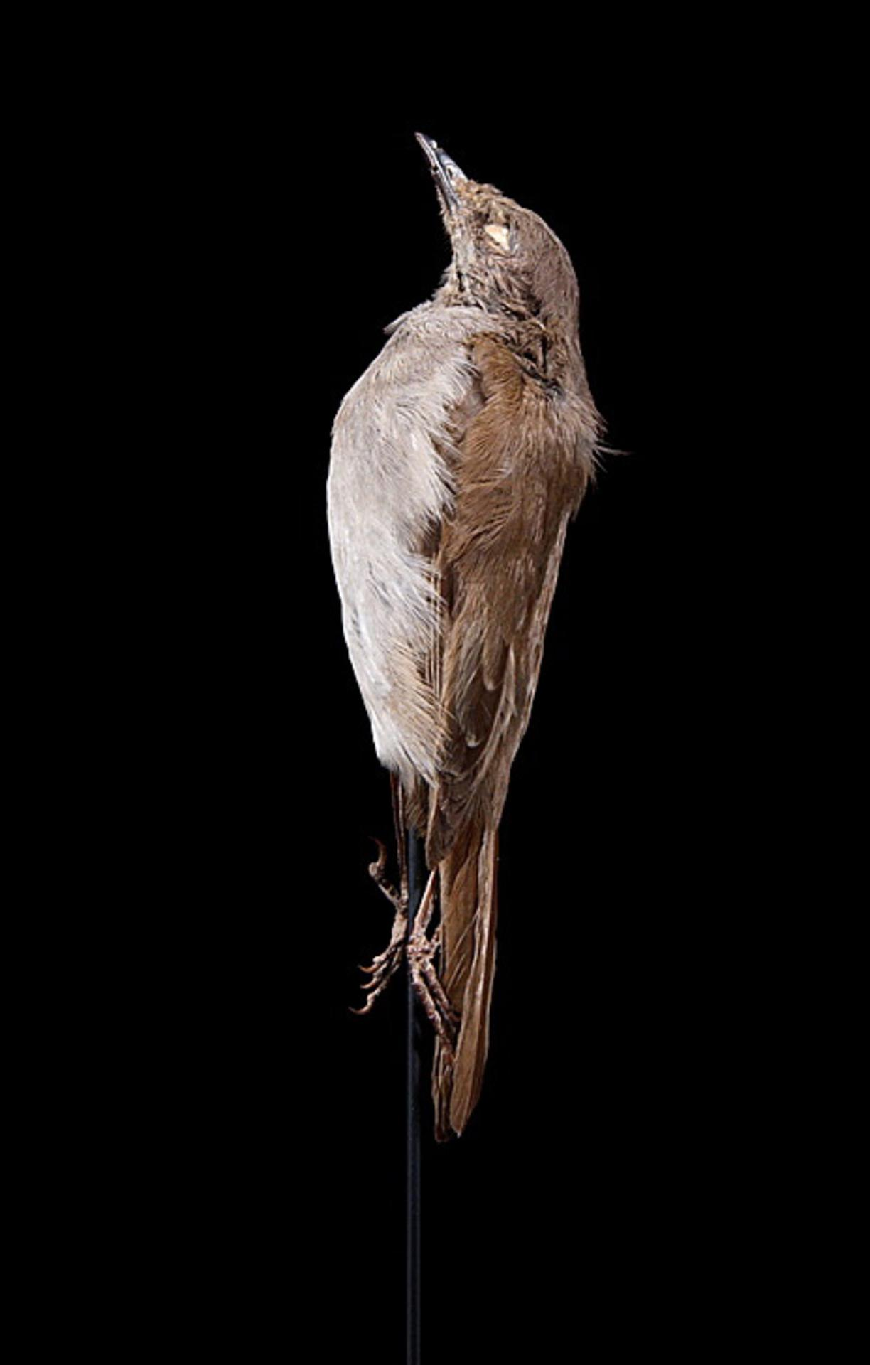 Myadestes lanaiensis lanaiensis (Wilson, 1891)